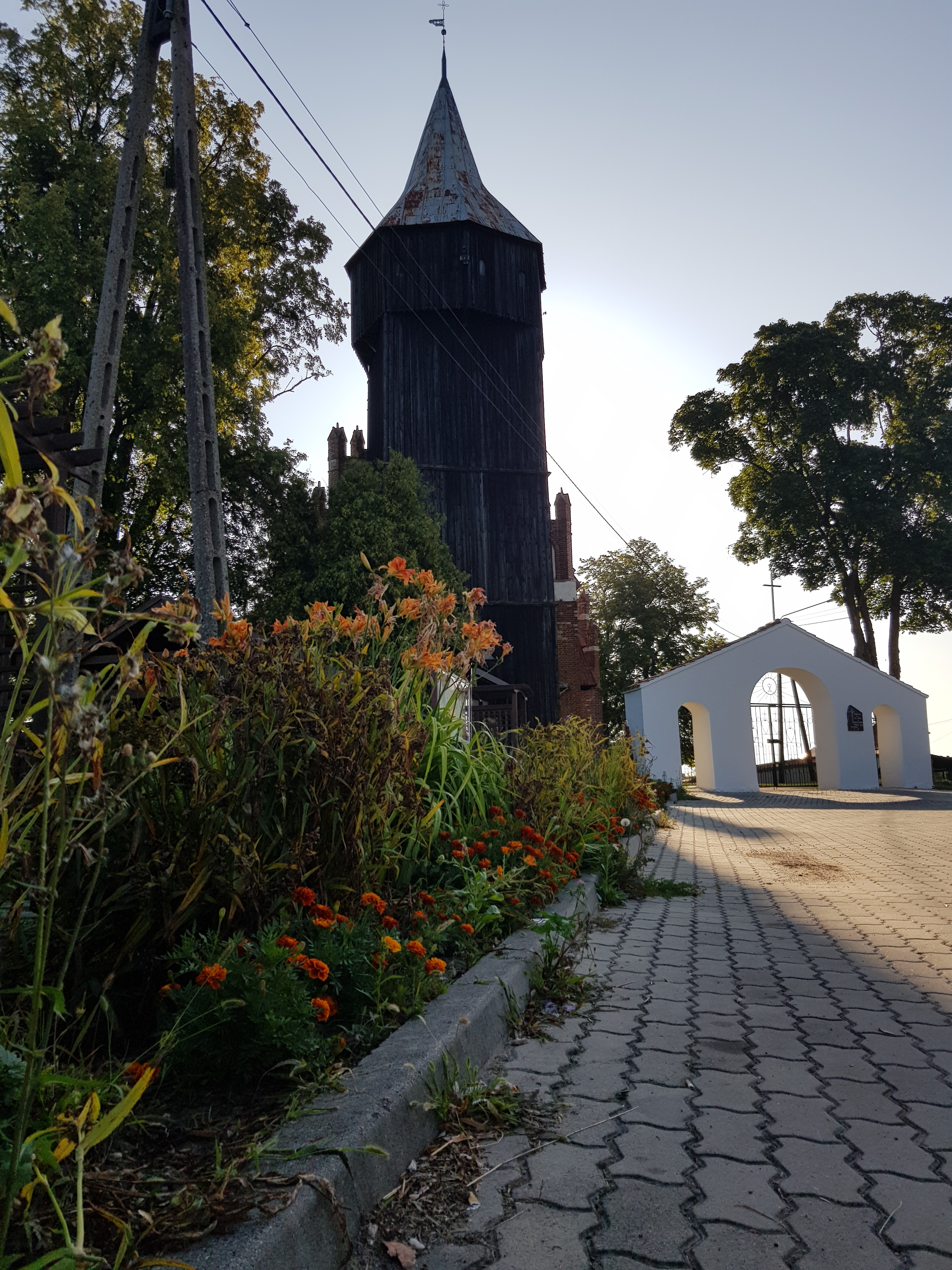 Kościół Rzymskokatolicki pw. św. Jerzego i św. Anny w Radostowie.